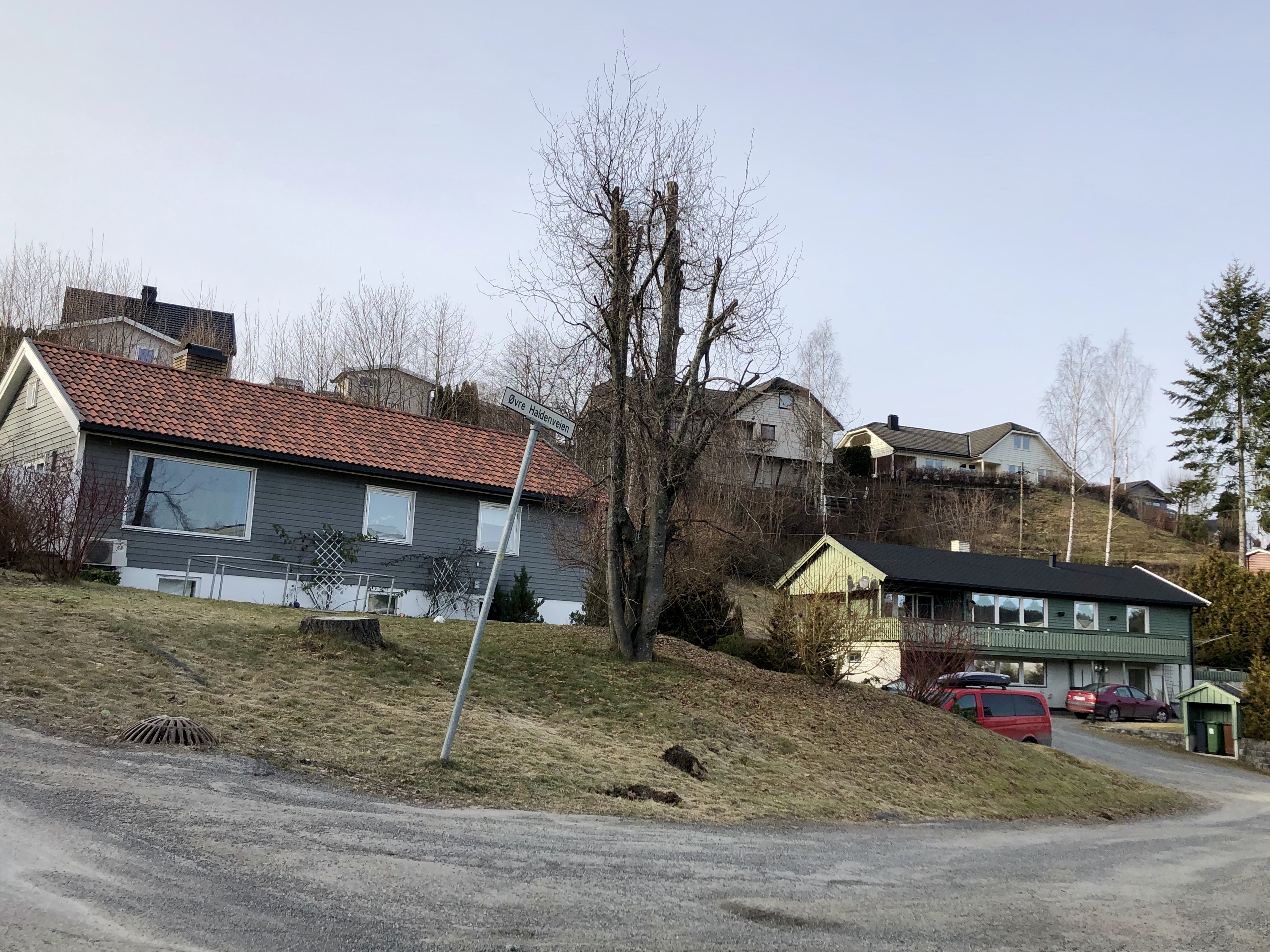 Øvre Haldenveien 2 og 4, Hønefoss